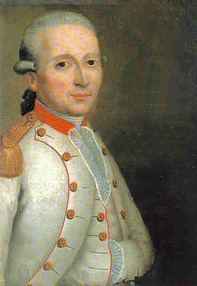 Thomas-Augustin de Gasparin, conventionnel, protecteur de Napoléon Bonaparte